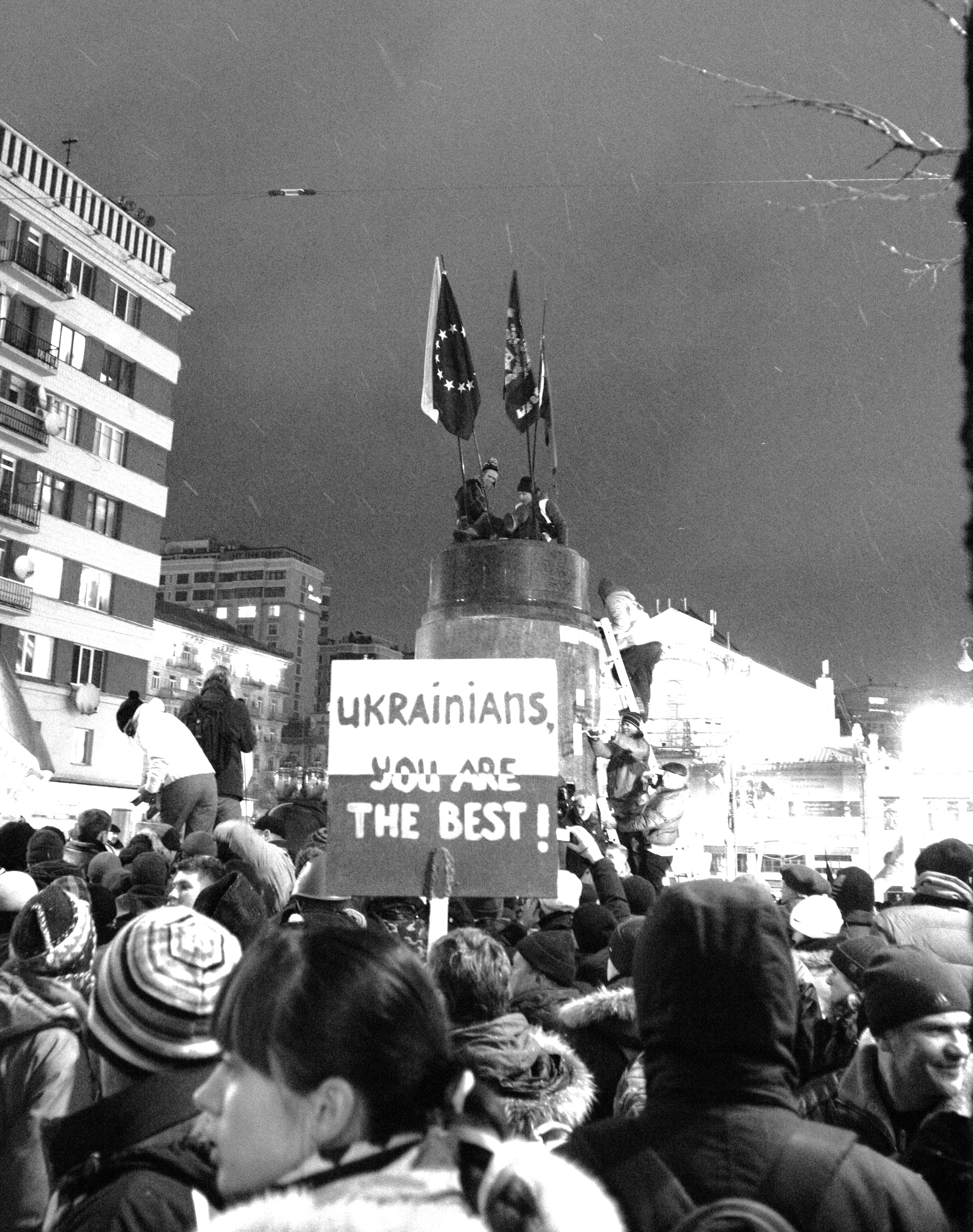 Після повалення пам'ятника Лєніну в Києві.